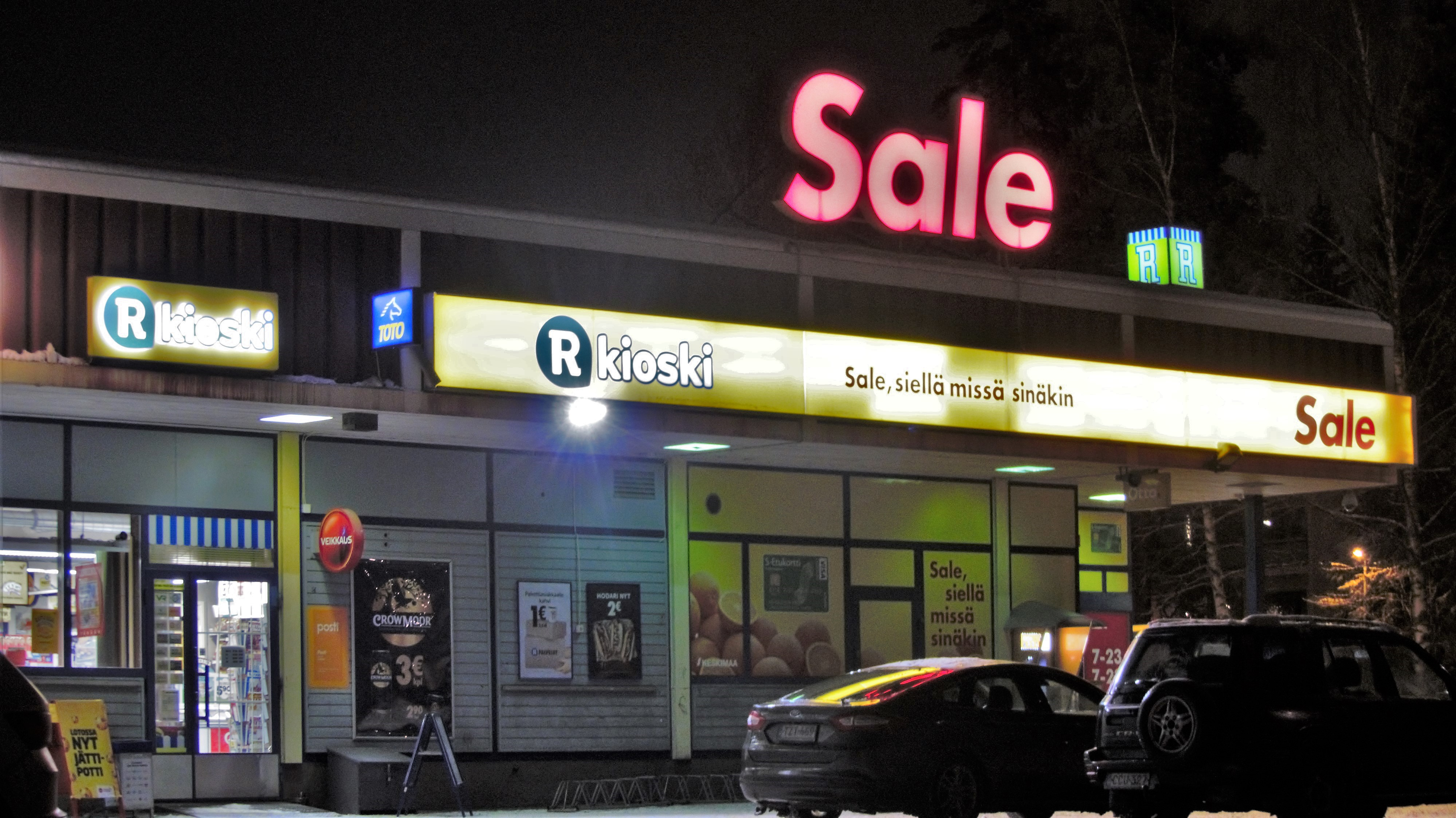 Keltinmäen vuonna 1977 valmistunut liikekeskus.